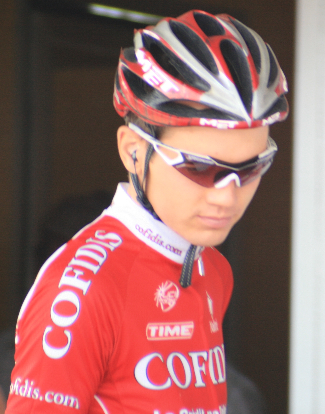 Rein Taaramae, à l'Eneco Tour 2008, à Ardooie